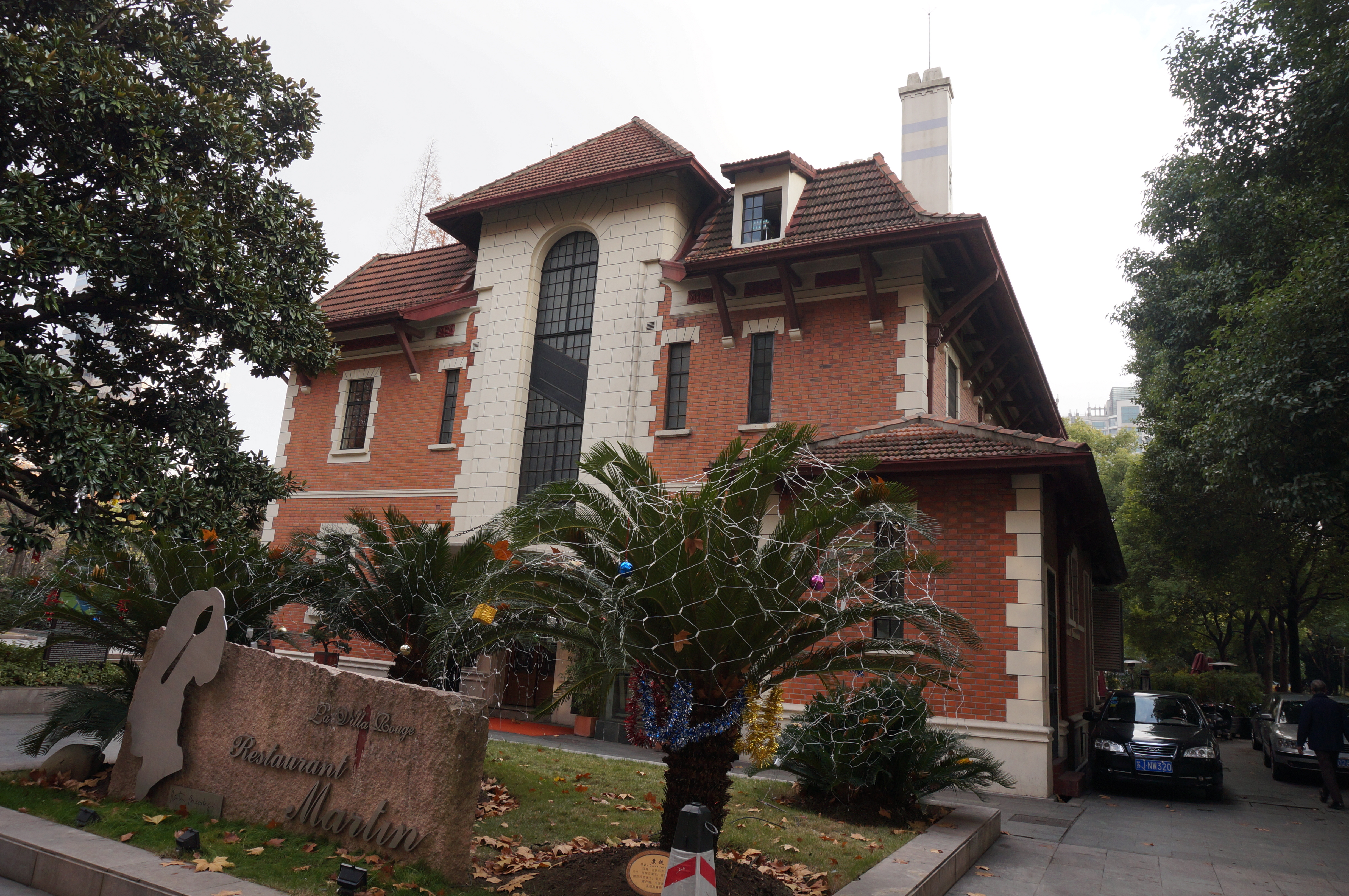 中国唱片厂（百代公司旧址）